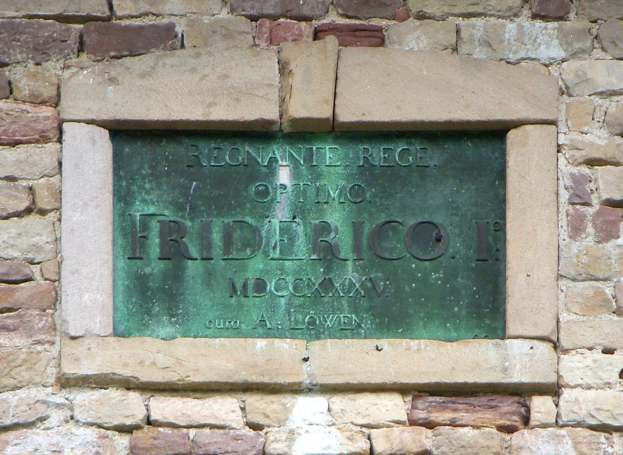 Fredriksborgs fästning i Värmdö kommun